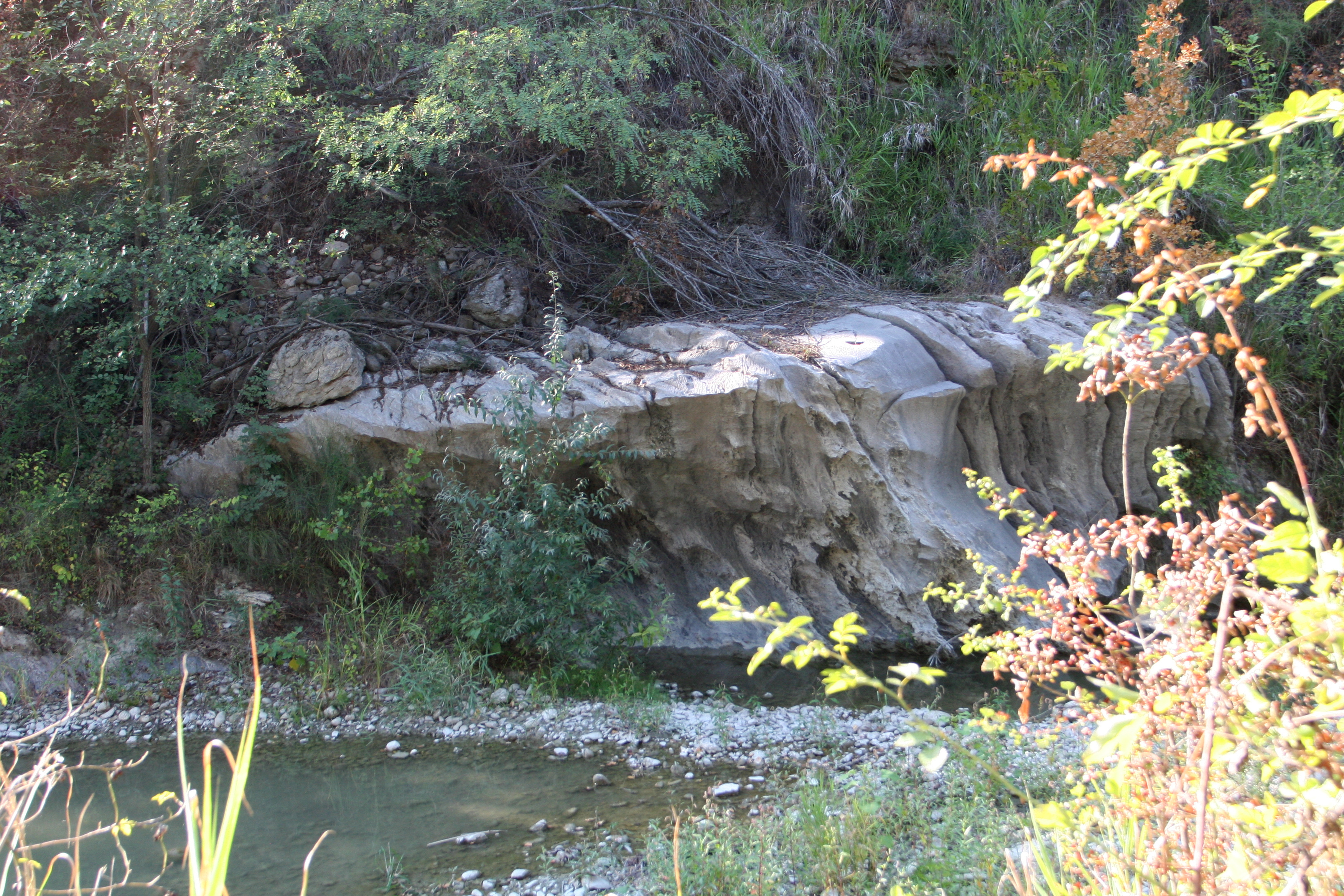 Gessi bolognesi all'interno dell' Oasi del Molino Grande nella frazione di Idice nel Comune di San Lazzaro di Savena (Bo). This is a photo of a monument which is part of cultural heritage of Italy. The authorisation for taking photos of this object was provided by the World Wide Fund for Nature Italy.